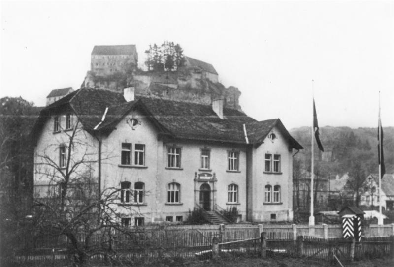 Die Karstschulungsstätte Pottenstein/Oberfranken Ein Bilderatlas mit Erläuterungen Zusammengestellt von SS-Standartenführer Dr. Brand. Inmitten des schönsten Teiles von Pottenstein liegt das SS-Lazarett und Truppenrevier.